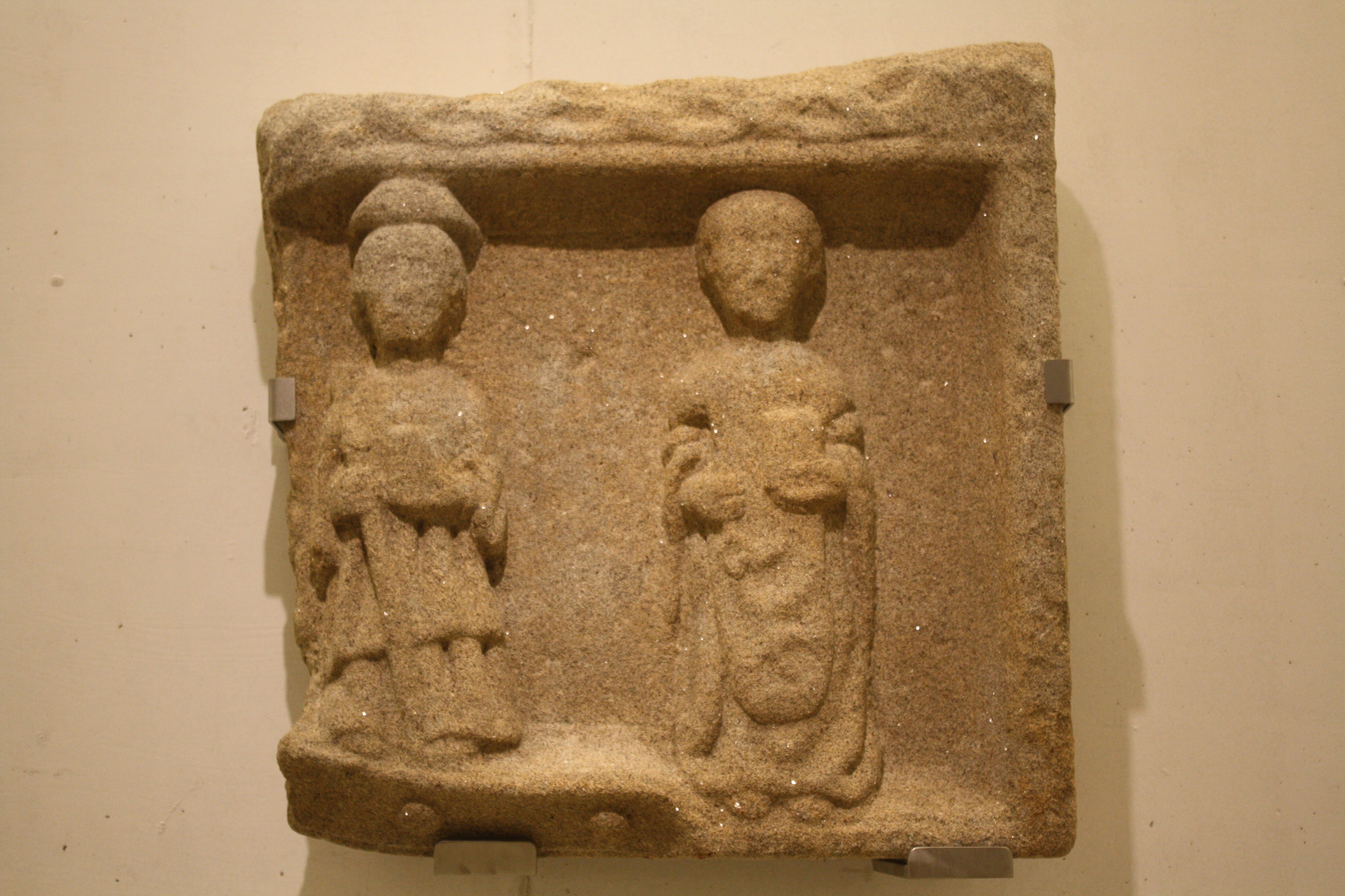 Fragmento do baldaquino de Santa Mariña de Bora (Pontevedra), representando a Santiago (á esquerda) e San Pedro (á dereita). Exposto no Museo de Pontevedra.